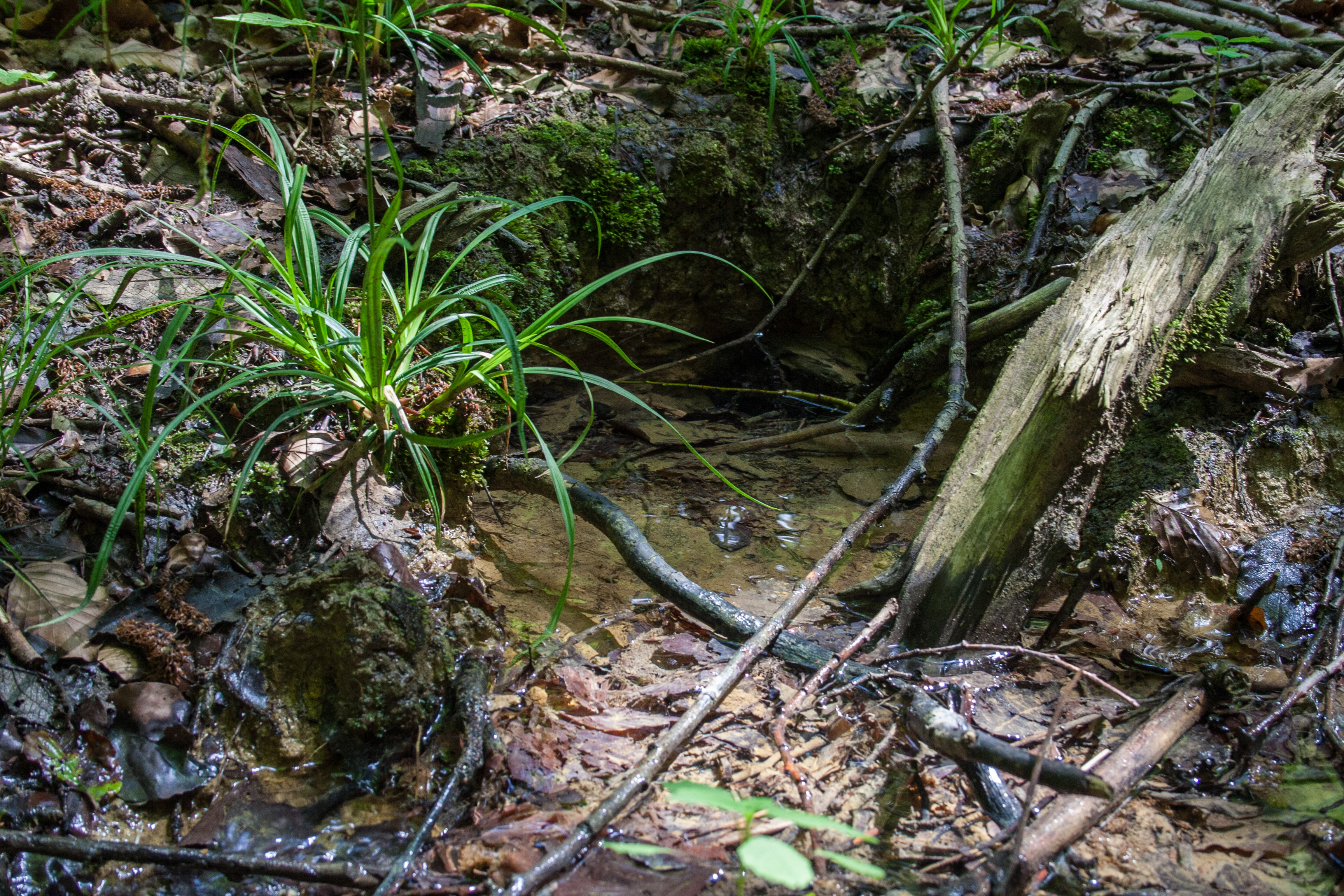 Steinerne Rinne, Buchenberg, Engelthal, Entenberg, Ausweisung des LSG "Südlicher Jura mit Moritzberg und Umgebung"